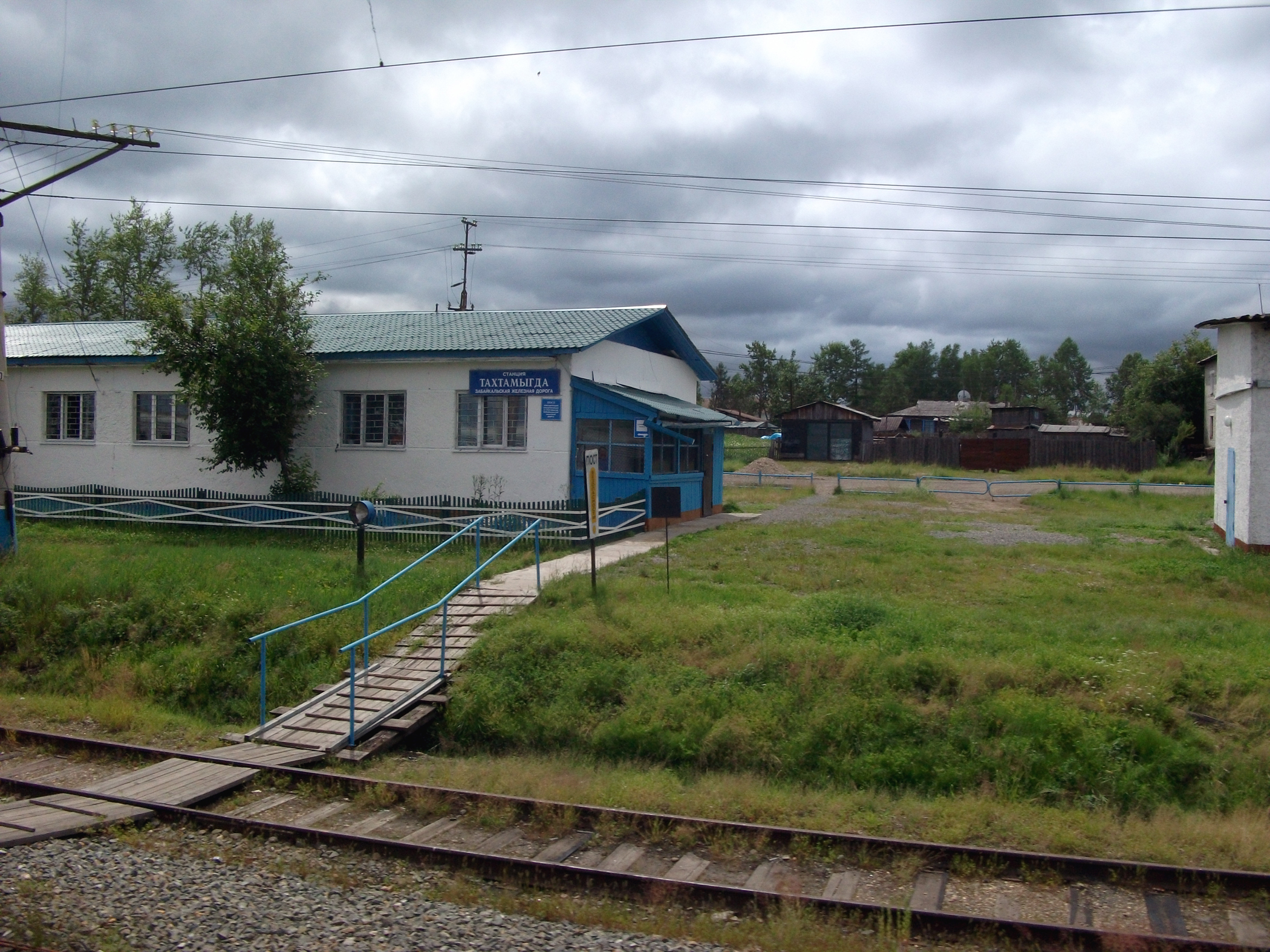 Железнодорожная станция Тахтамыгда